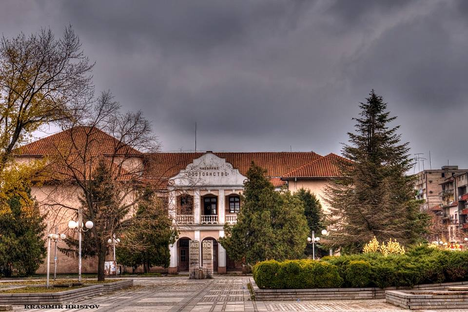 читалище